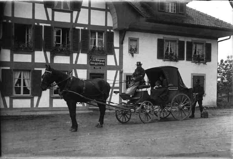 Postkutsche mit Passagieren vor der Post Rüeggisberg (Kanton Bern / Schweiz